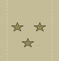 ՀՀ ԶՈՒ-ի ավագ լեյտենանտ զինվորական կոչում